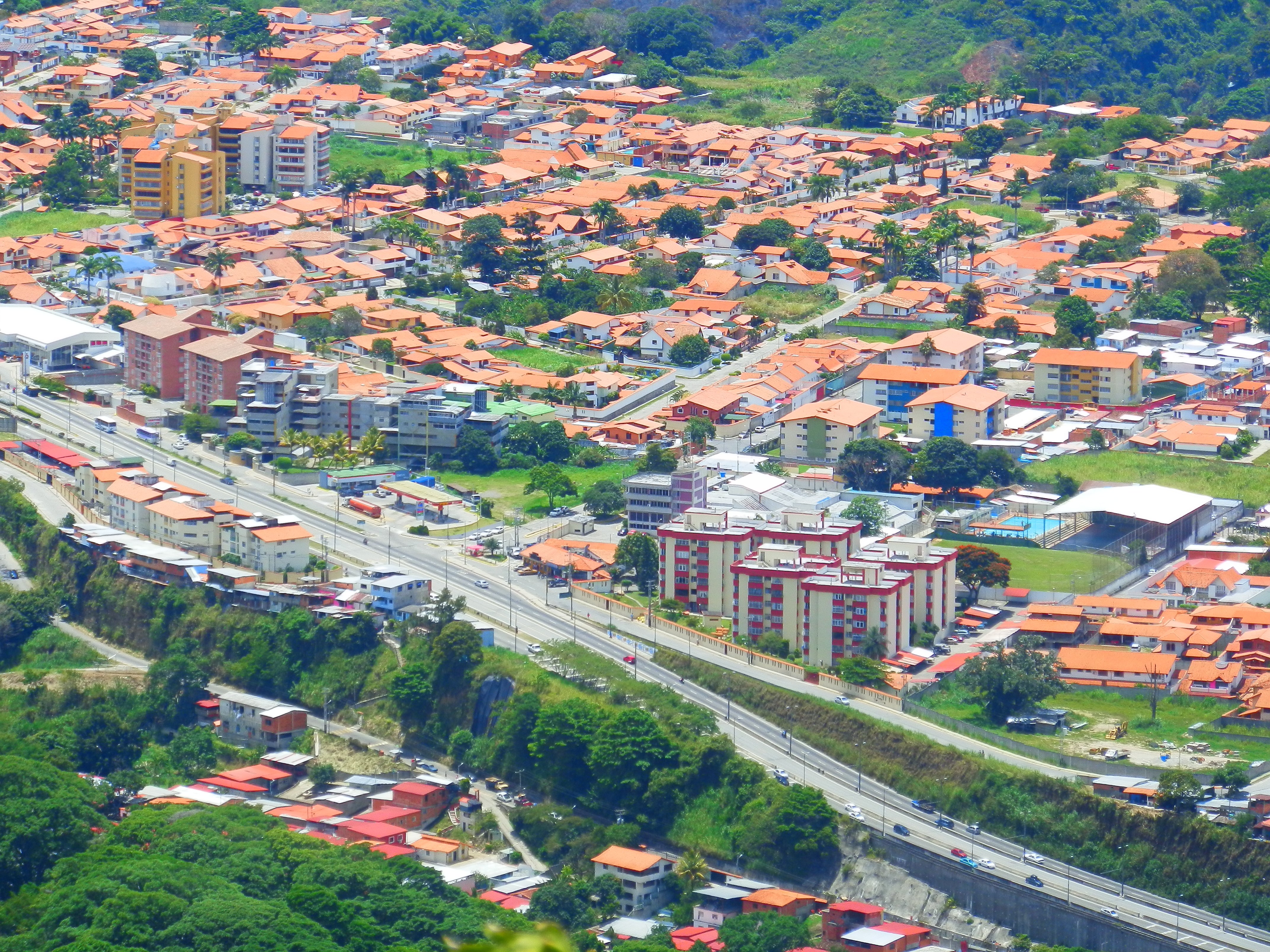 Sur de Mérida (Venezuela)